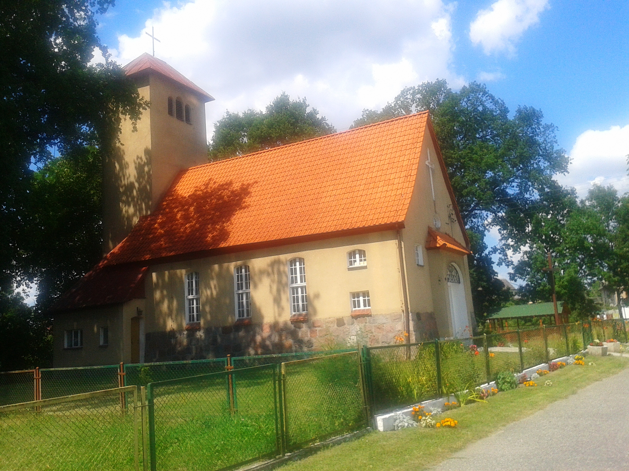 Grabowo - rzymskokatolicki kościół filialny p.w. Podwyższenia Krzyża Świętego